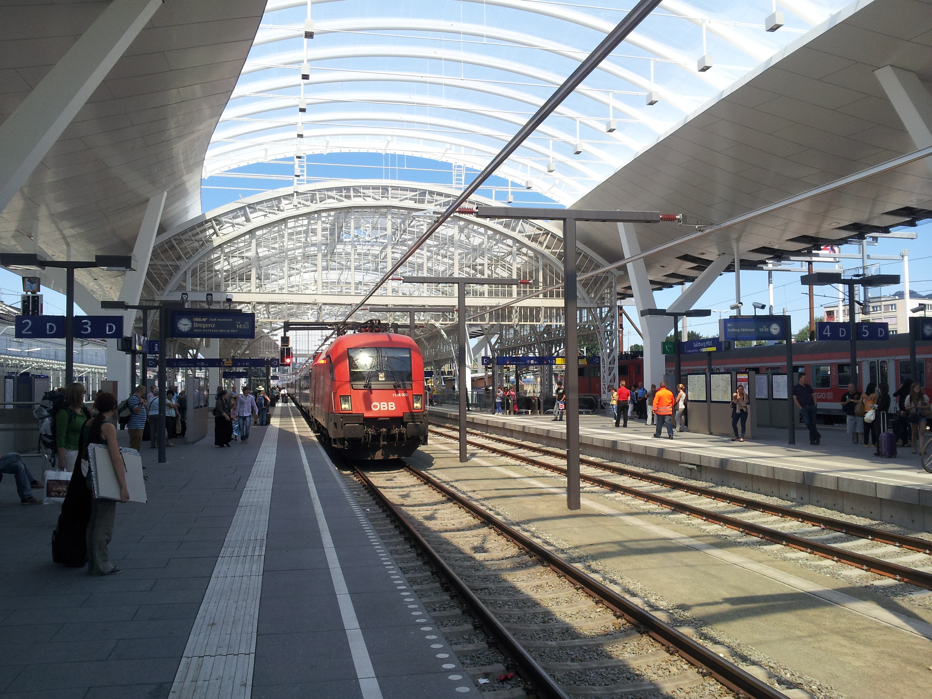 Salzburg Hauptbahnhof mit rekonstruierter Stahlkonstruktion des ehemaligen Mittelbahnsteiges, einfahrender IC mit ÖBB 1116